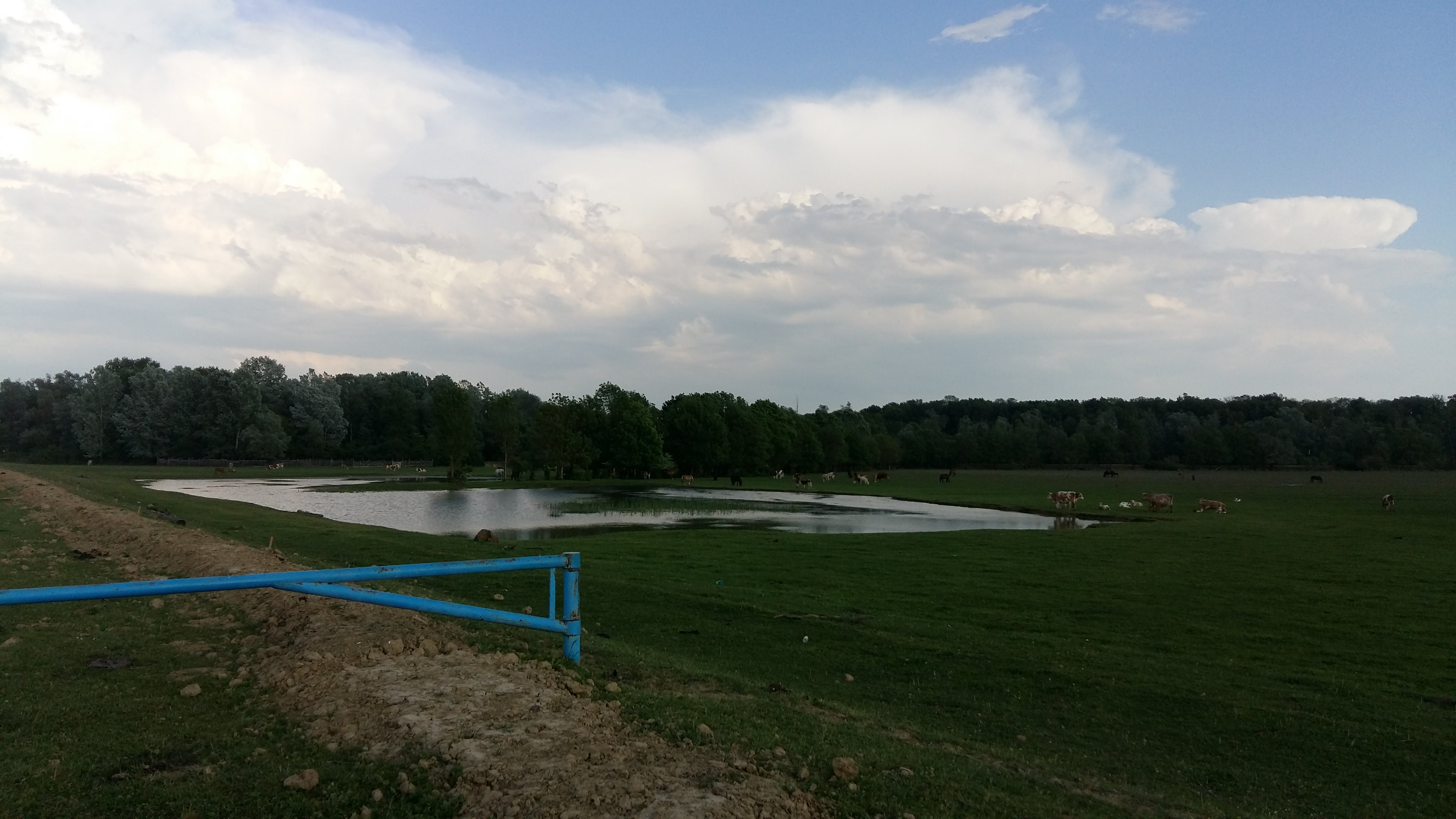 Lonjsko polje, Repušnica